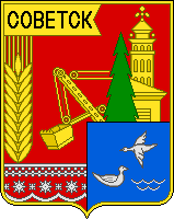 Герб Советска (Кировская область, 1972 год)